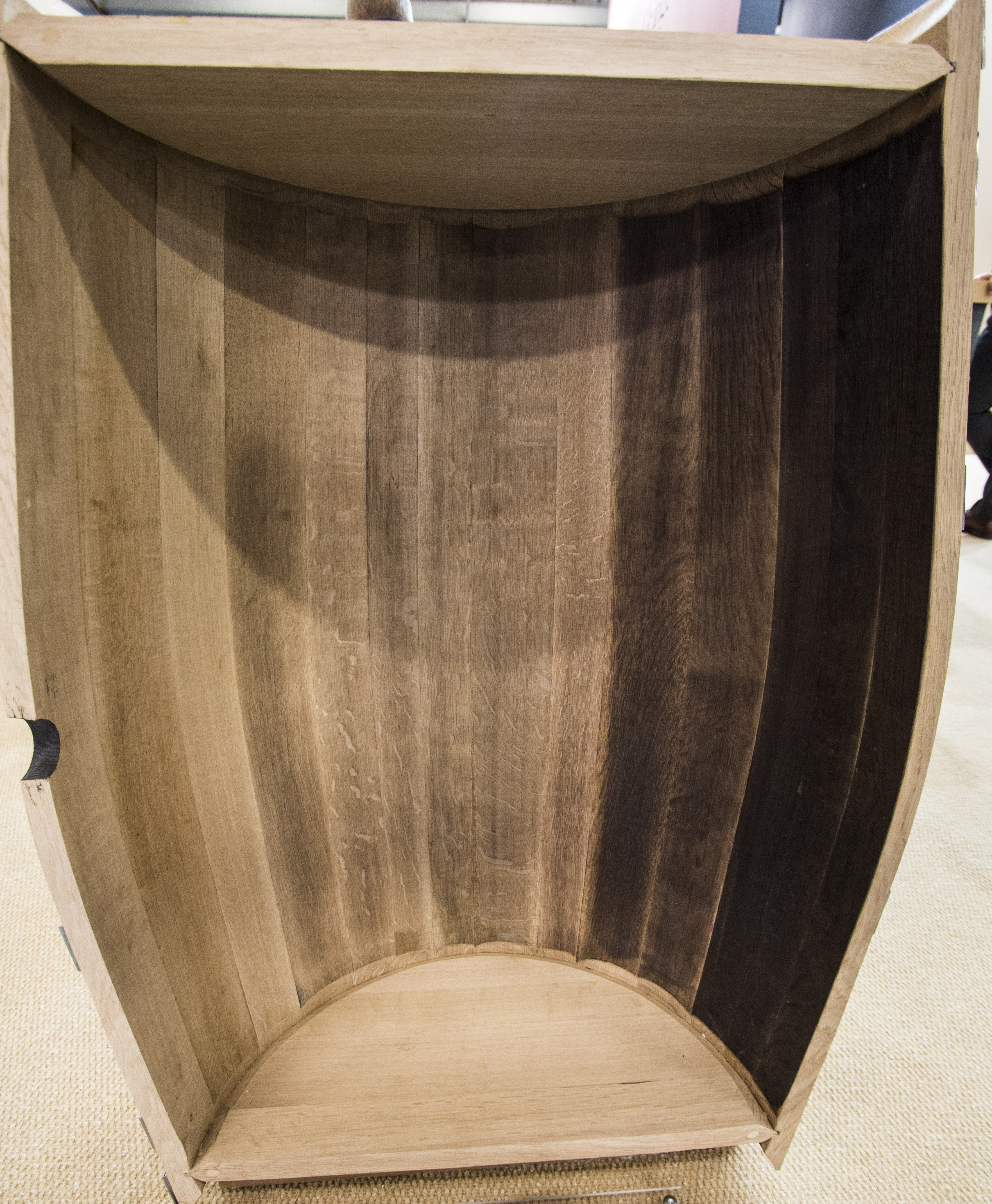 SITEVI 2017 - Différentes chauffes sur un fût, de gauche à droite : Légère, Moyenne moins, Moyenne, Moyenne plus, Forte